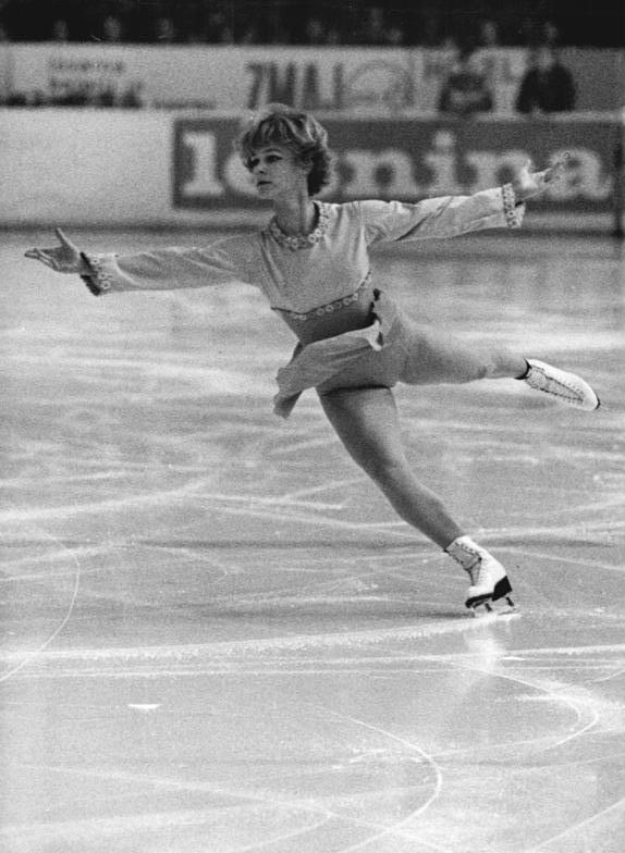 Gabriele Seyfert Zentralbild Thieme 14.3.1970-str.-Vorschaufoto zur Schaulauftournee der ISU.- Auf ihrer Europatournee werden sich die Weltmeister, Medaillengewinner und Plazierten der Eiskunstlauf-Weltmeisterschaft von Ljubljana am 24.-25.3. in Karl-Marx-Stadt und Berlin vorstellen. Vor heimischem Publikum wird Doppelweltmeisterin Gabriele Seyfert besonders gefeiert werden.